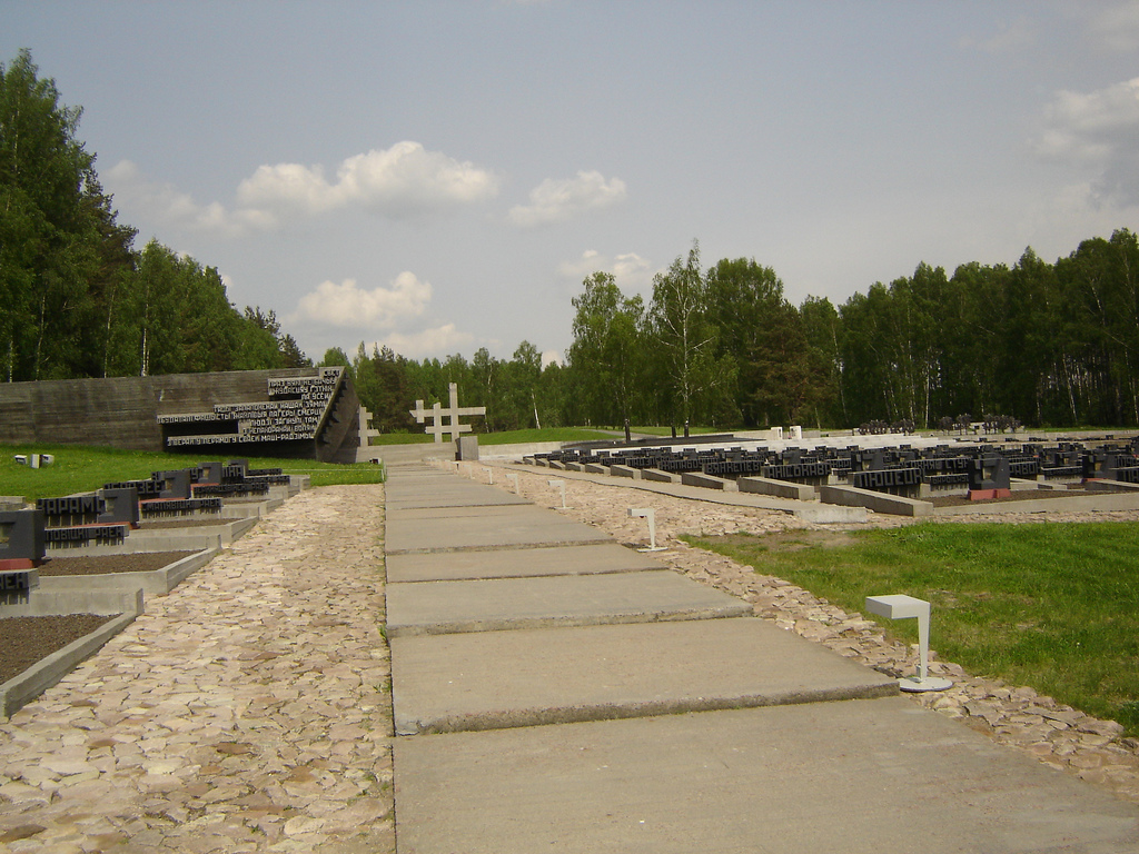 Khatyn_Belarus_May_2007 297